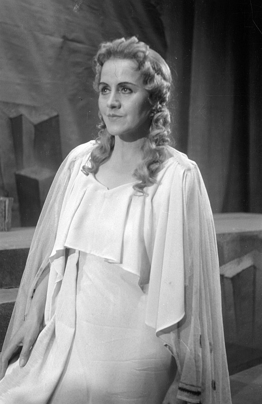 Original image description from the Deutsche FotothekSchluss-Szene und Rollenporträts, Anneliese Müller als Orpheus und Tiana Lemnitz als Eurydike